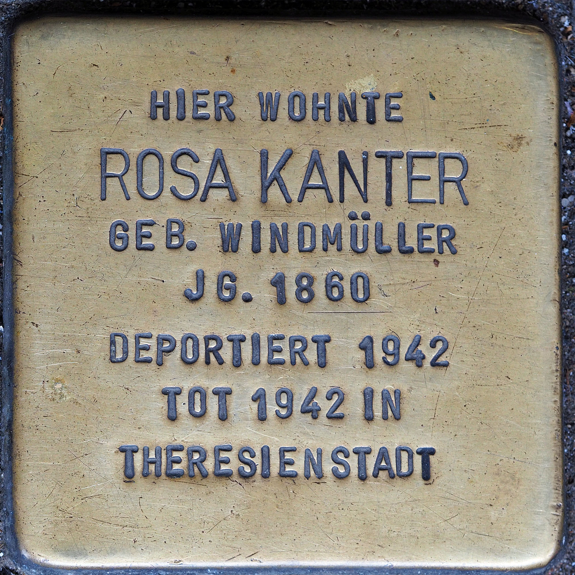 Stolpersteine MG: Kanter, Rosa